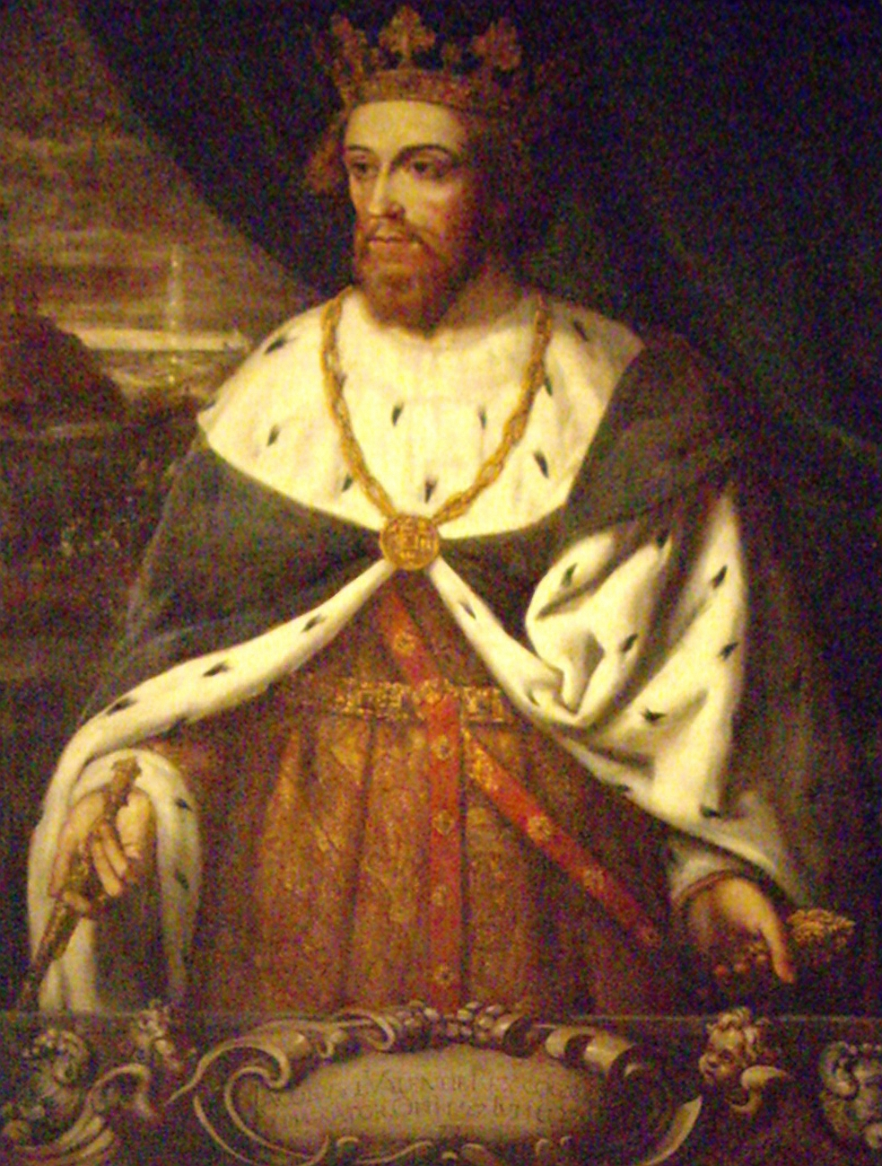 DRetrat de Jaume I.